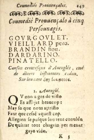 Garpard Zerbin, Musos Prouvençalo